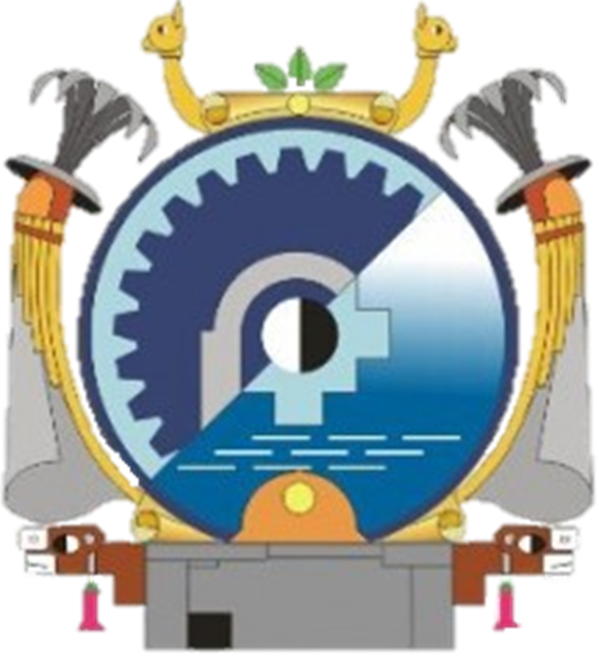 Región de Puno